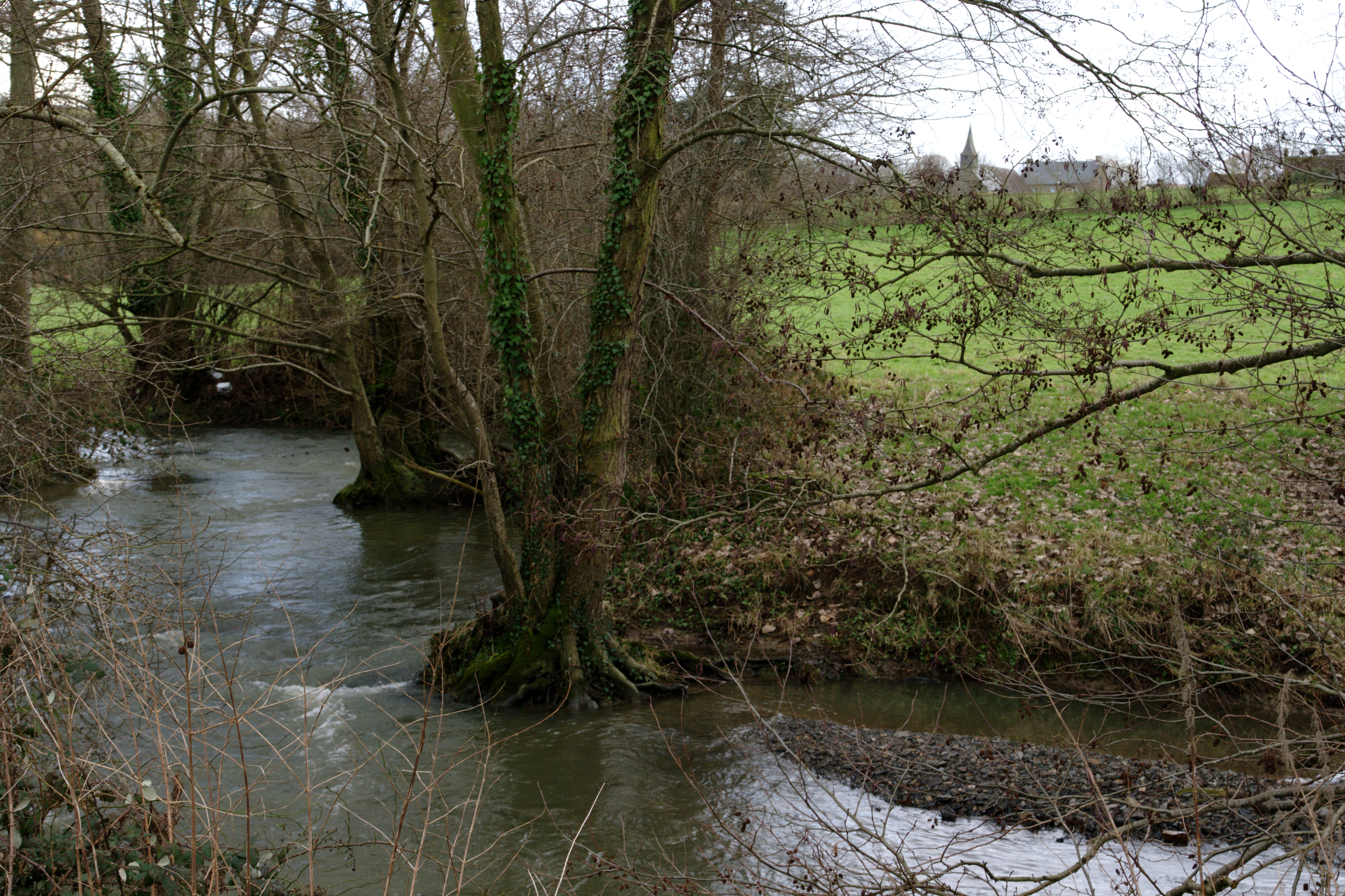 Méandres de la rivière "La Baize" sur la commune des Isles-Bardel, Calvados.